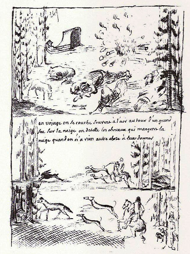 Croquis de voyage de Jacques Jubé : la chasse